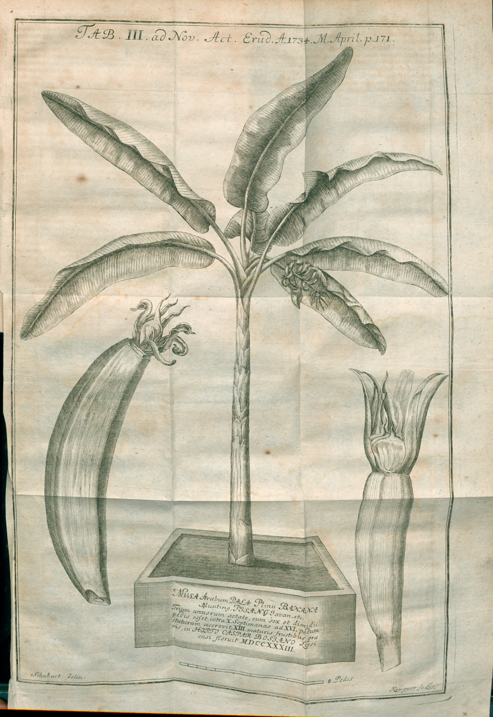 Illustration